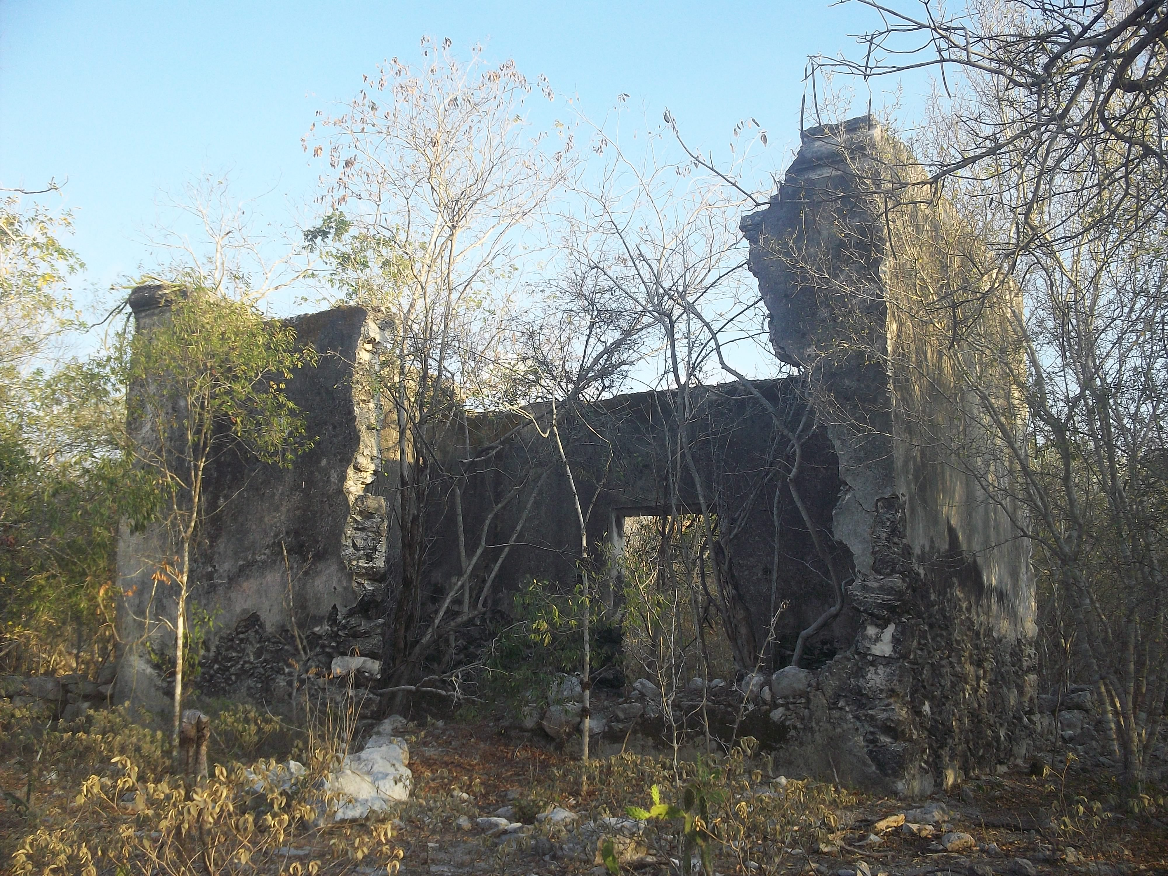 Hoboyná, Yucatán.